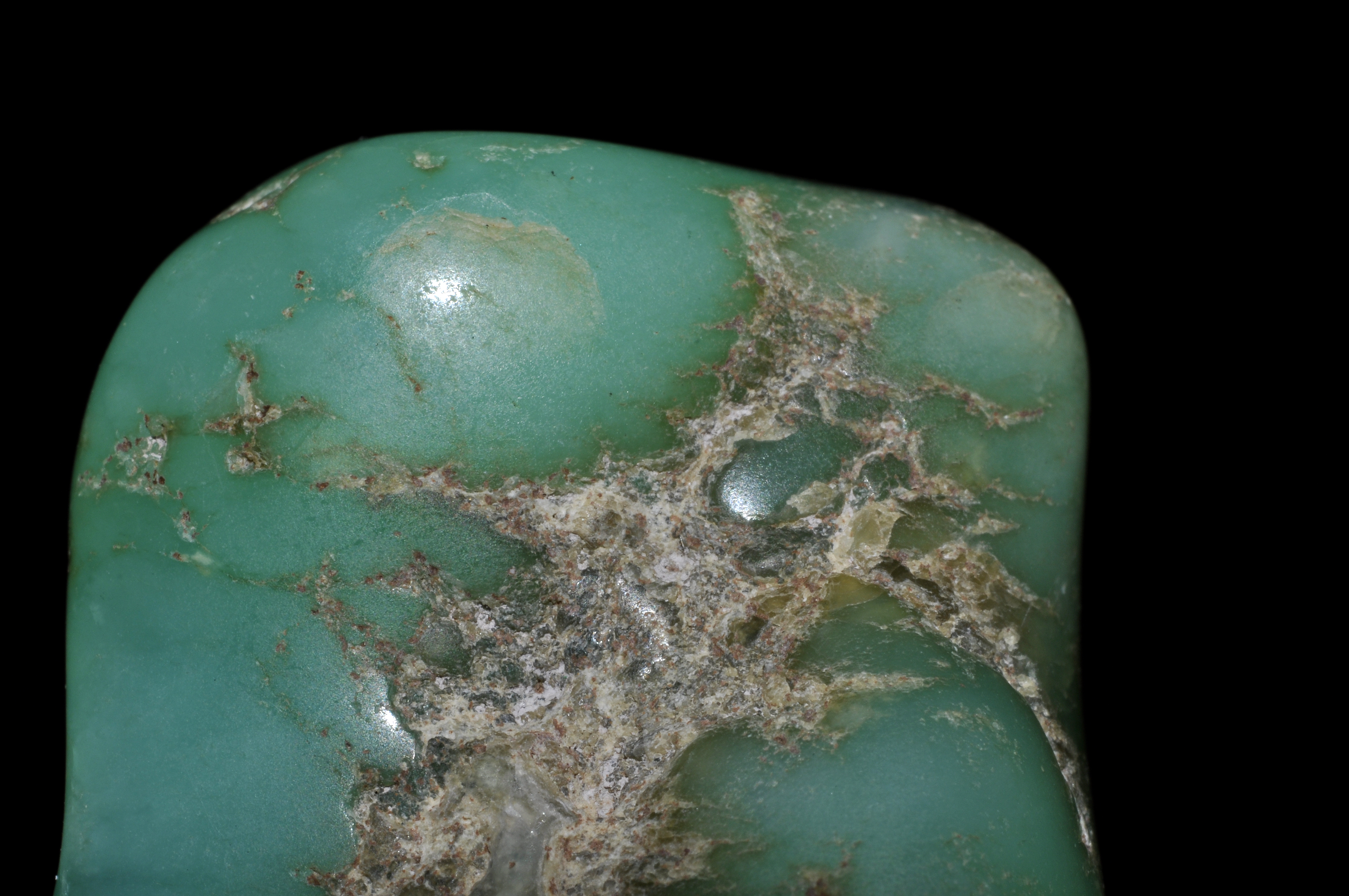 Chrysoprase polie